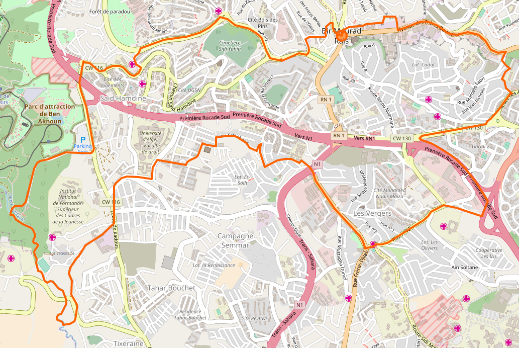 Limites administratives de la commune de Bir Mourad Rais